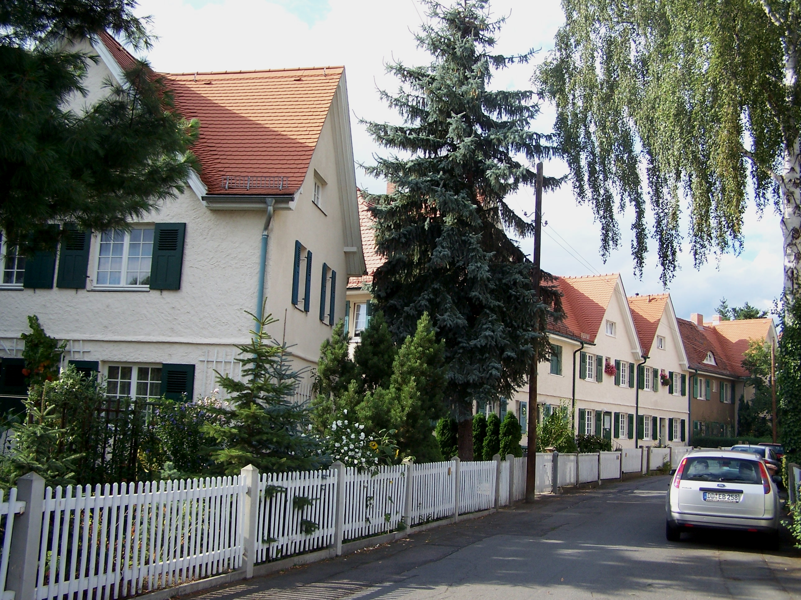 Wohnhäuser "Am Dorffrieden" Nr. 1-3-5-7-9-11-13 in Dresden-Hellerau